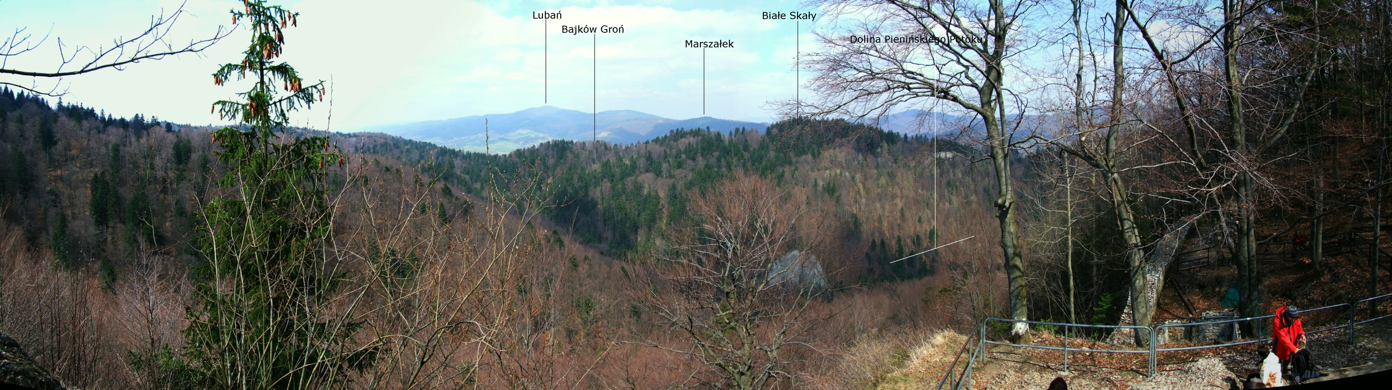 Widok z Zamkowej Góry w Pieninach